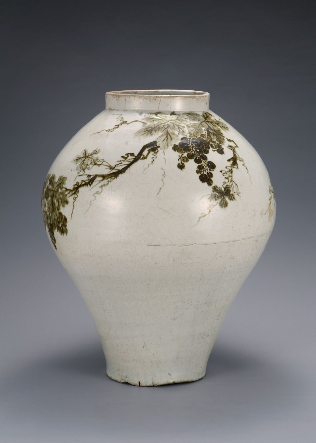 국보 제 107호